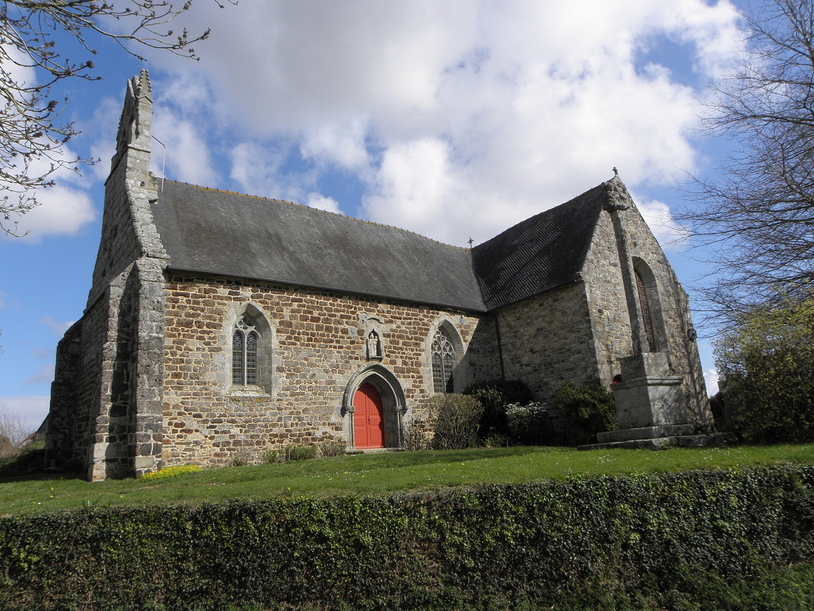 Flanc sud la chapelle Notre-Dame de Liscorno en Lannebert (22). .